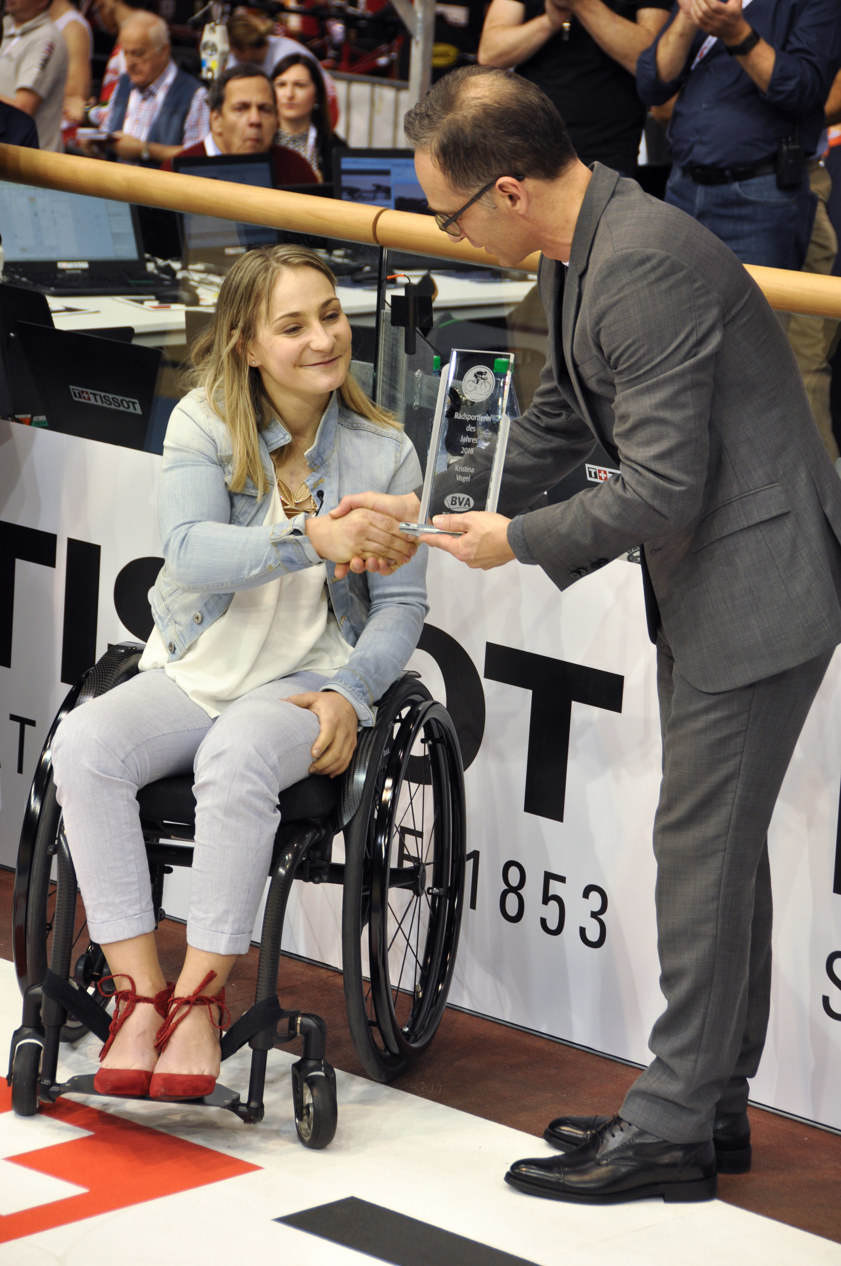 Ehrung Radsportler/in des Jahres: Kristina Vogel, Bundesminister Heiko Maas